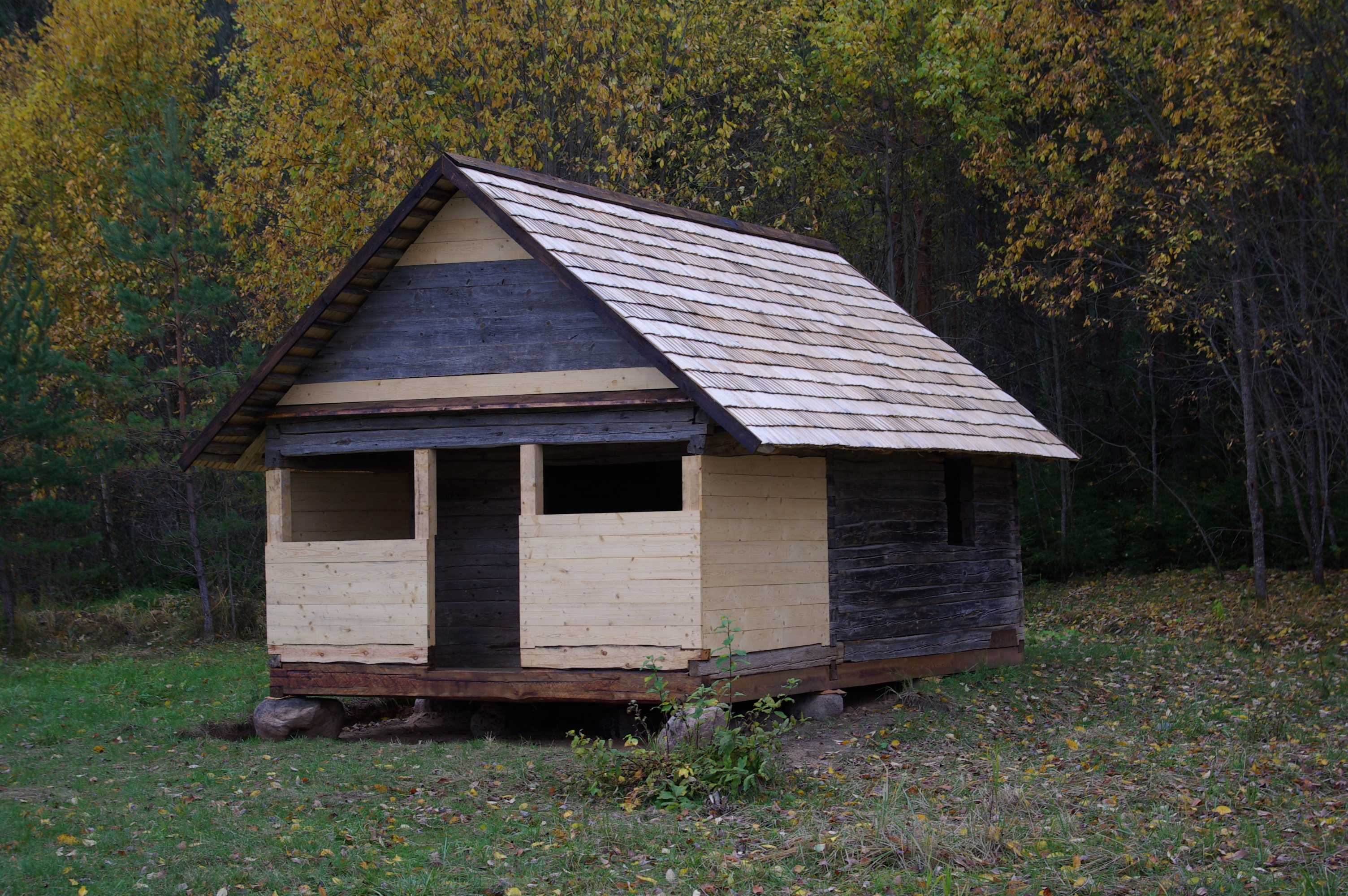 Võmmorski vana tsässon